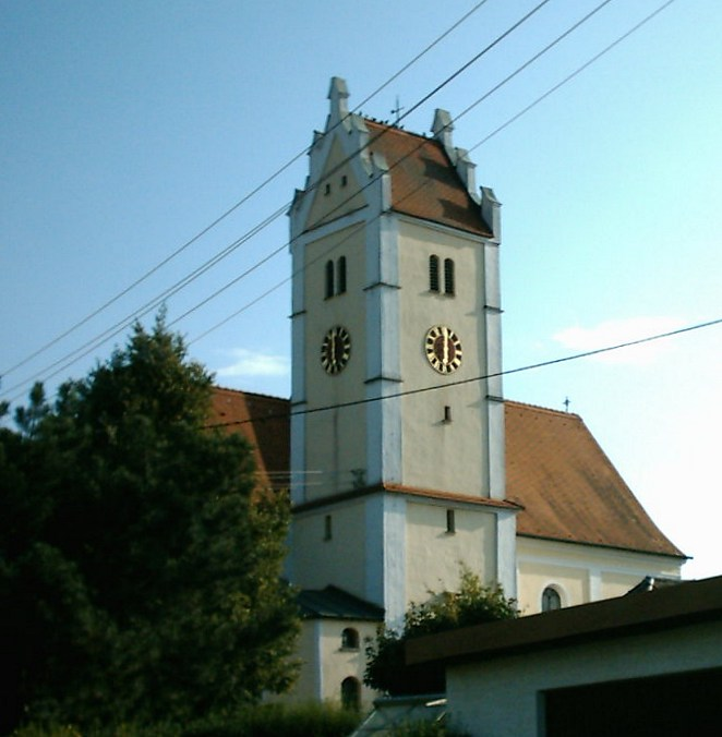 Pfarrkirche Mariä Geburt in Gebenhofen (Gemeinde Affing) // Nord-Ost-Ansicht